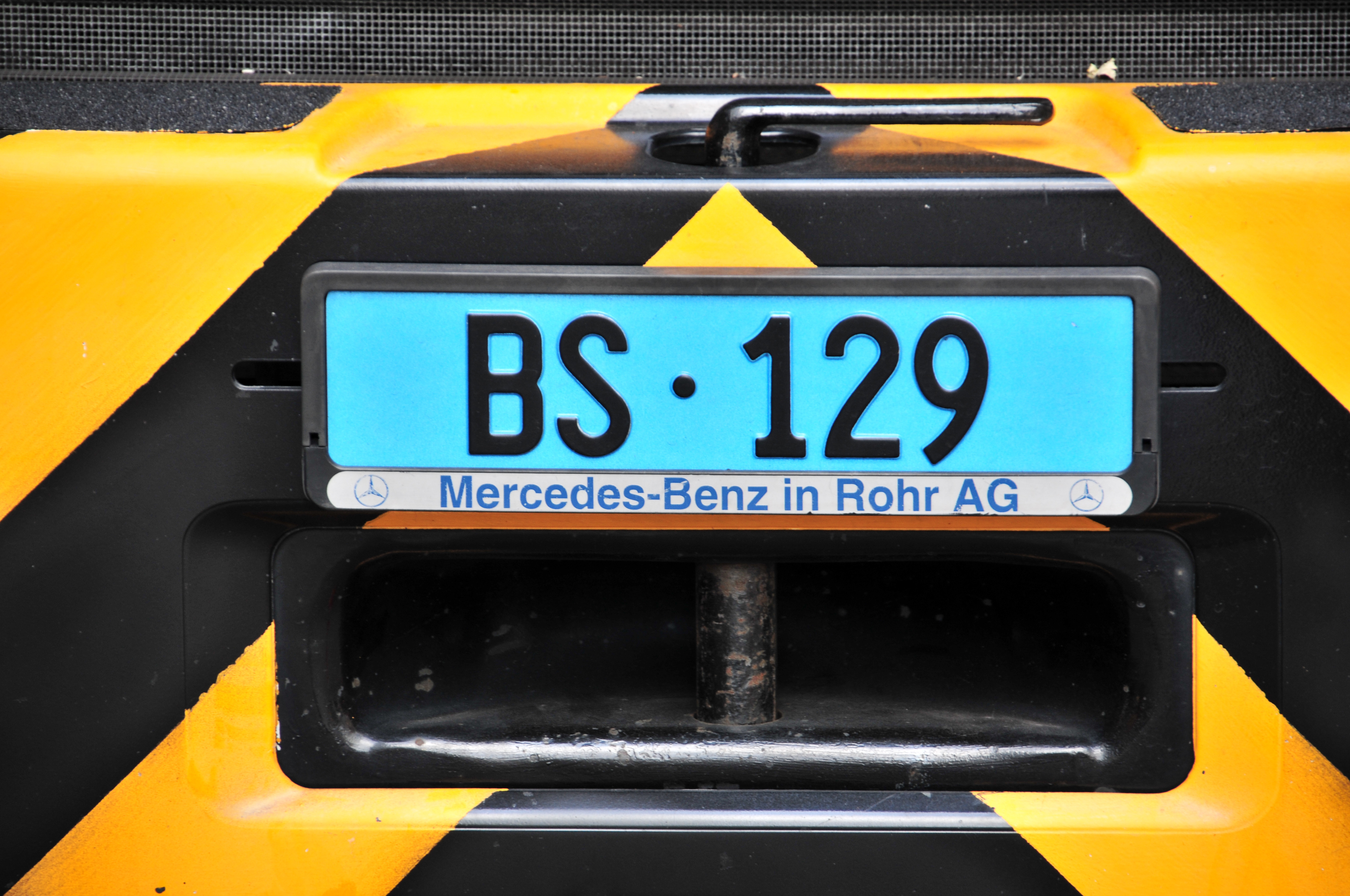 Basel